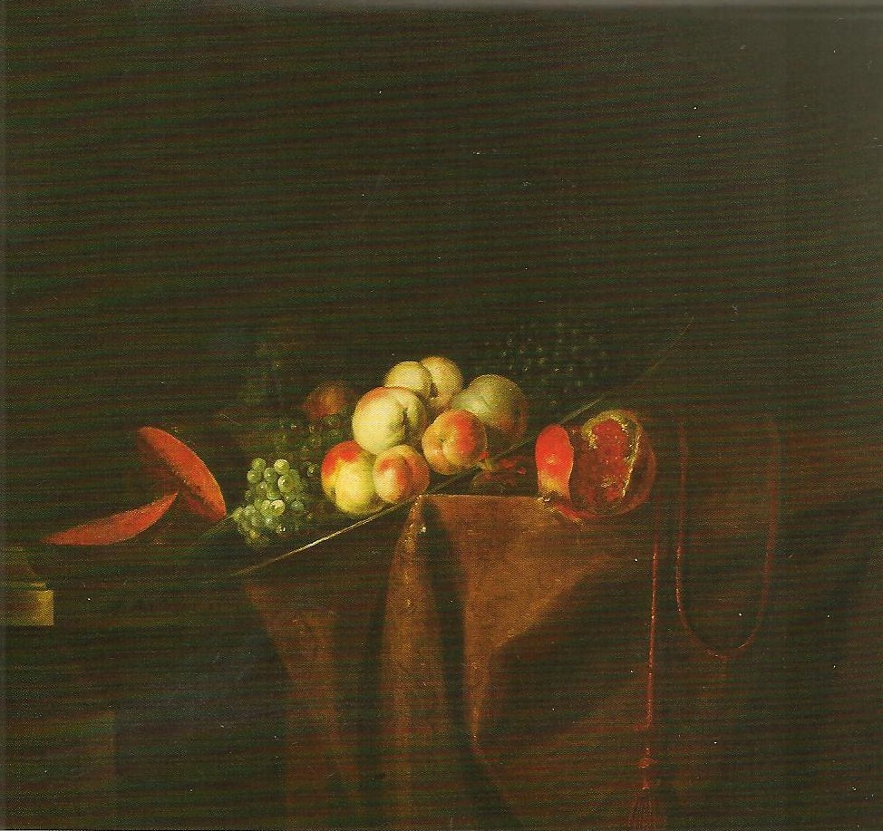 Nature morte aux pêches,grenades et autres fruits, signé Antoine Babron vers 1770. Nature morte de l'Ecole Française